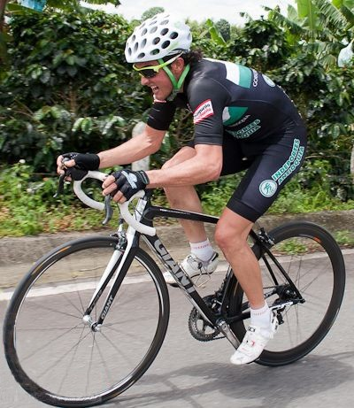 Oscar Sevilla, compitiendo por el equipo colombiano Gobernación de Antioquia-Indeportes Antioquia